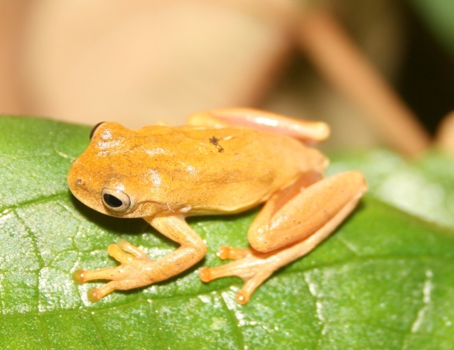 Dendropsophus minutus